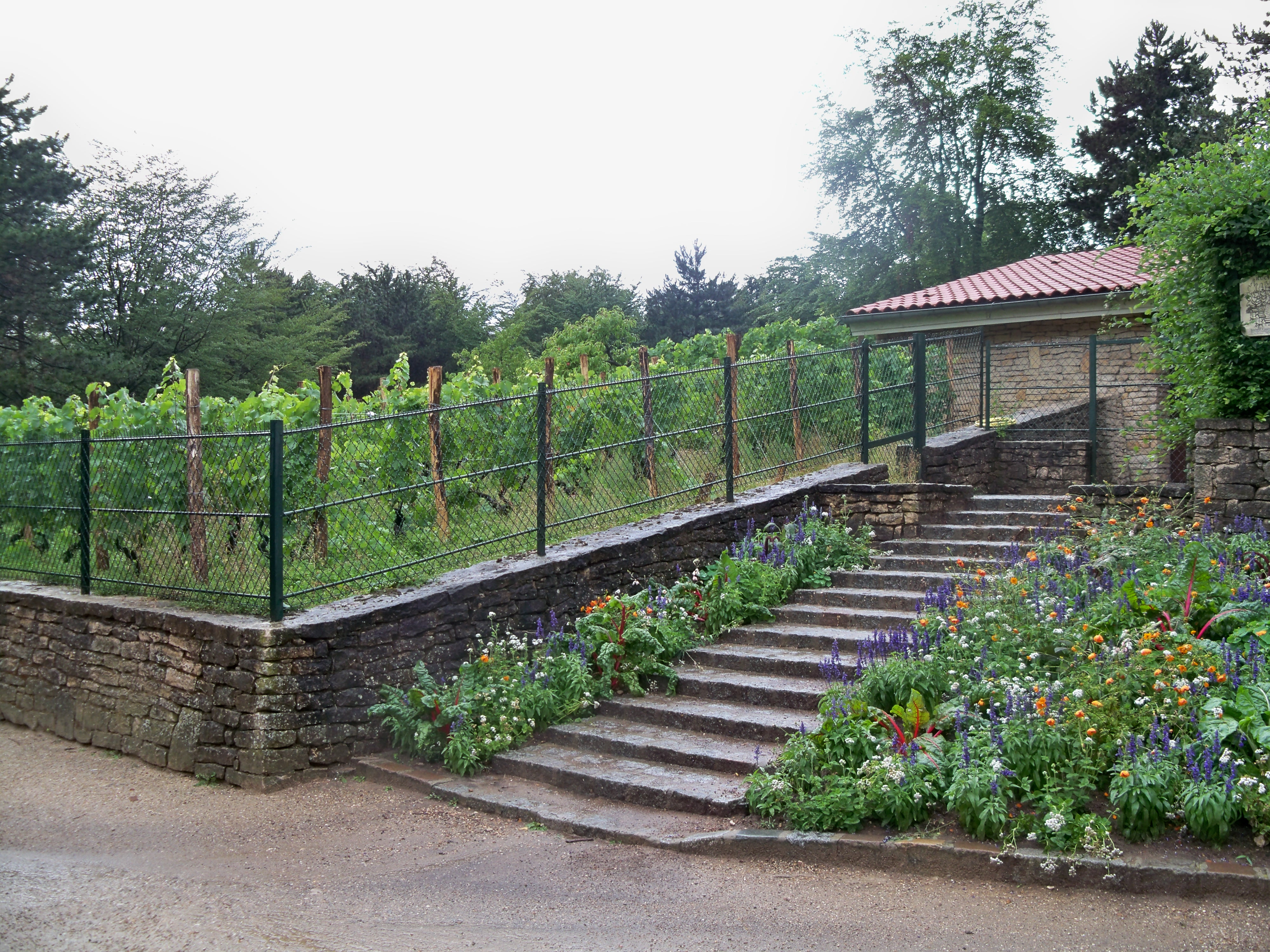 Vignoble parisien au parc Georges Brassens